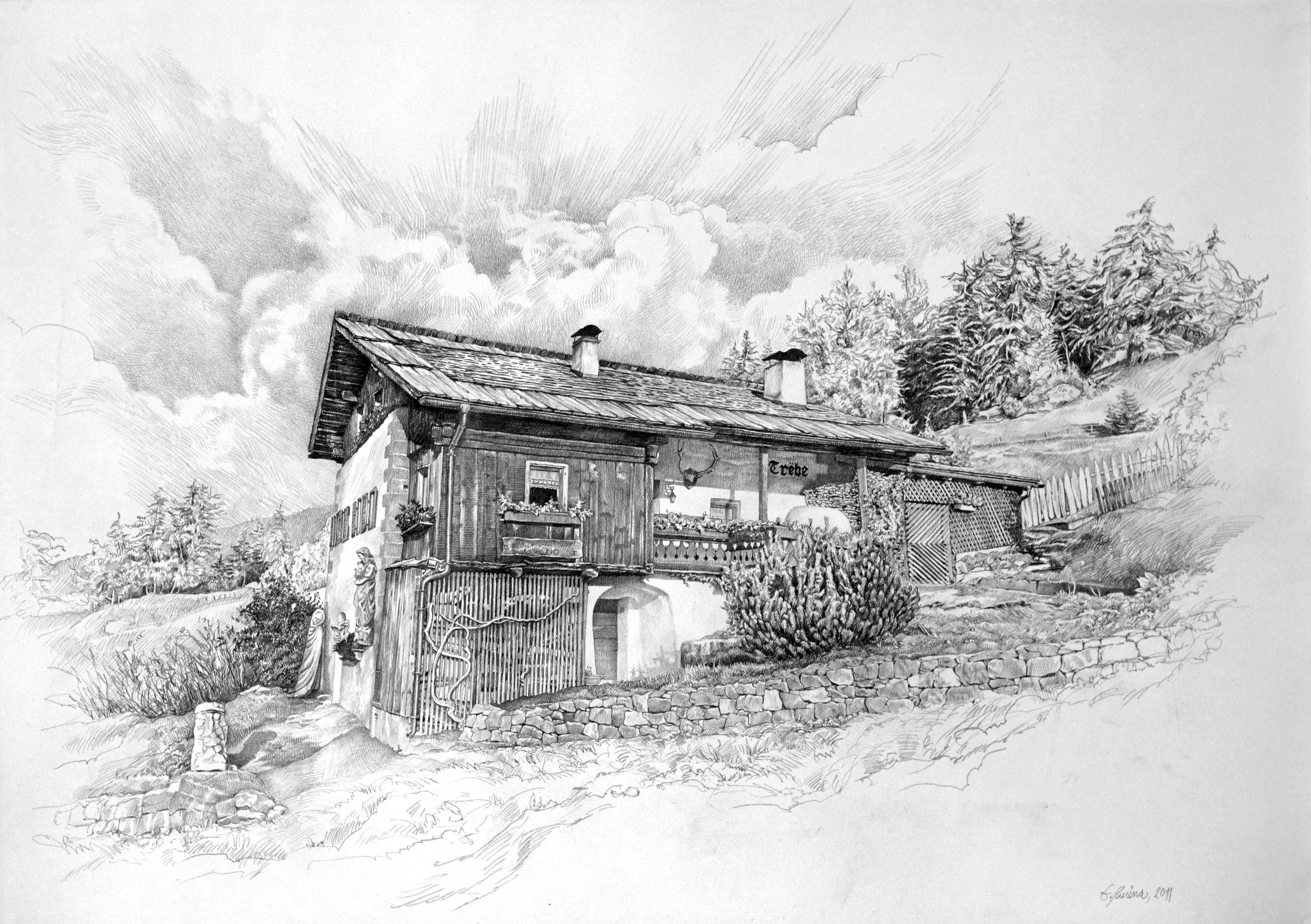 House in St. Jakob St. Ulrich in Gröden